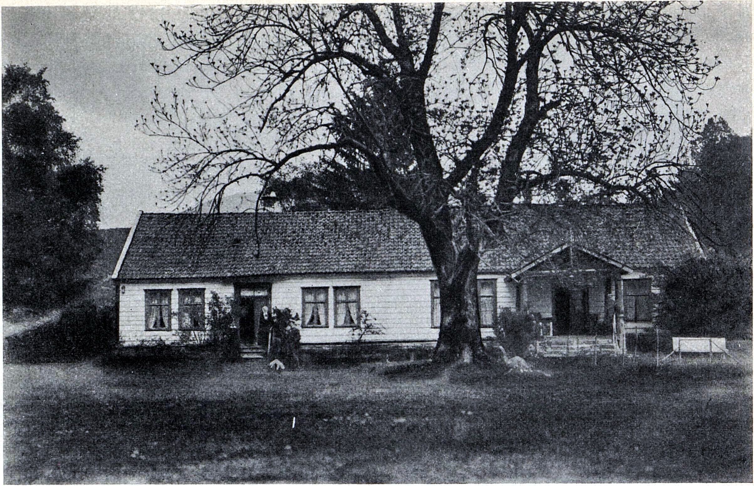 «Yttre Skeid 1920», i Hjalmar Christensen: Skeid (yttre). Bergen, 1922, s. 16